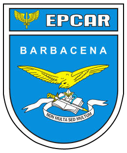 coat of arms of Escola Preparatória de Cadetes da Aeronáutica.